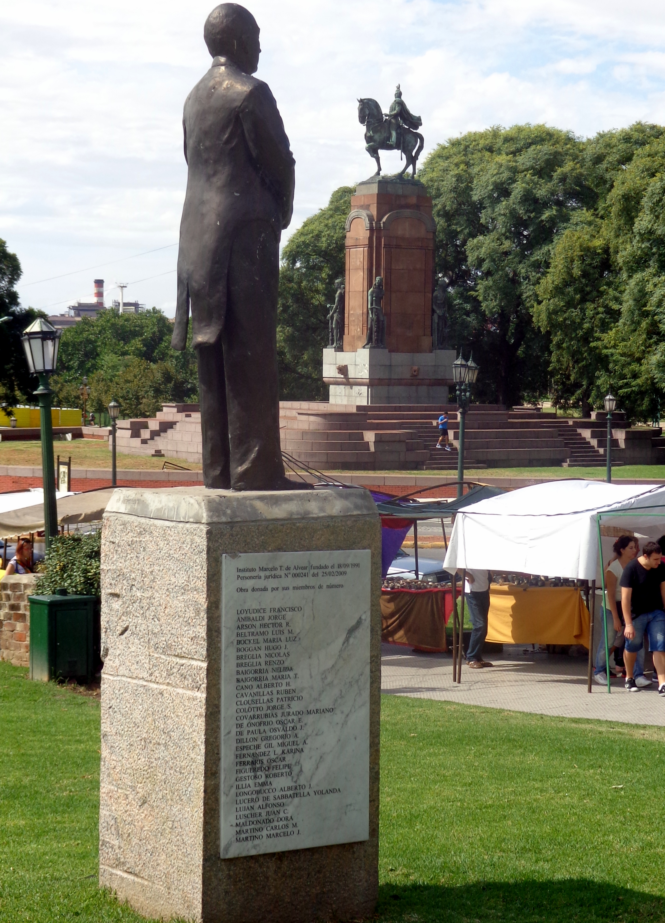 A la izquierda: estatua de Marcelo Torcuato de Alvear (obra de Gerson Irala). A la derecha: Monumento ecuestre a Carlos María de Alvear (obra de Antoine Bourdelle). Plaza Intendente Torcuato de Alvear, en el barrio de Recoleta, Buenos Aires, Argentina.